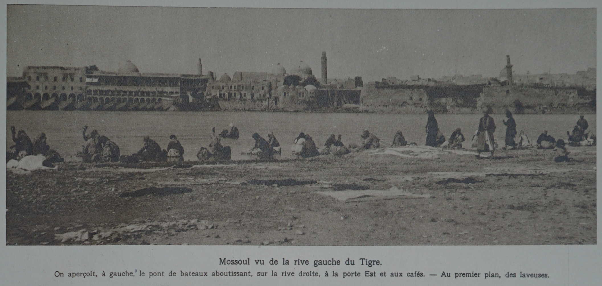 tiré du journal l'Illustration de 1920.